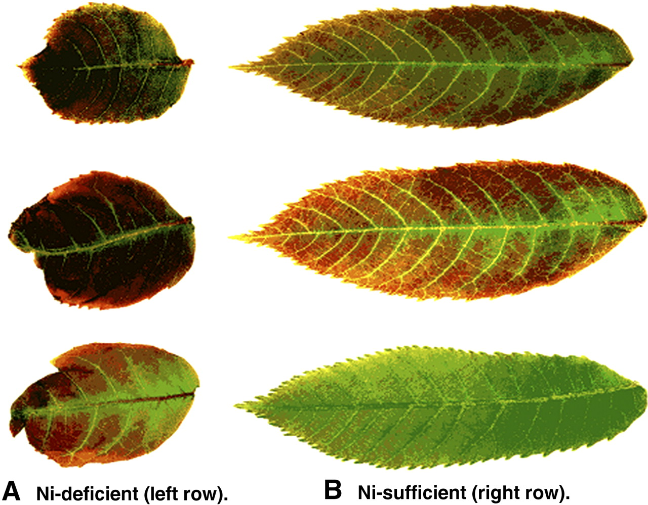 نمایش اثر نیکل بر گیاه